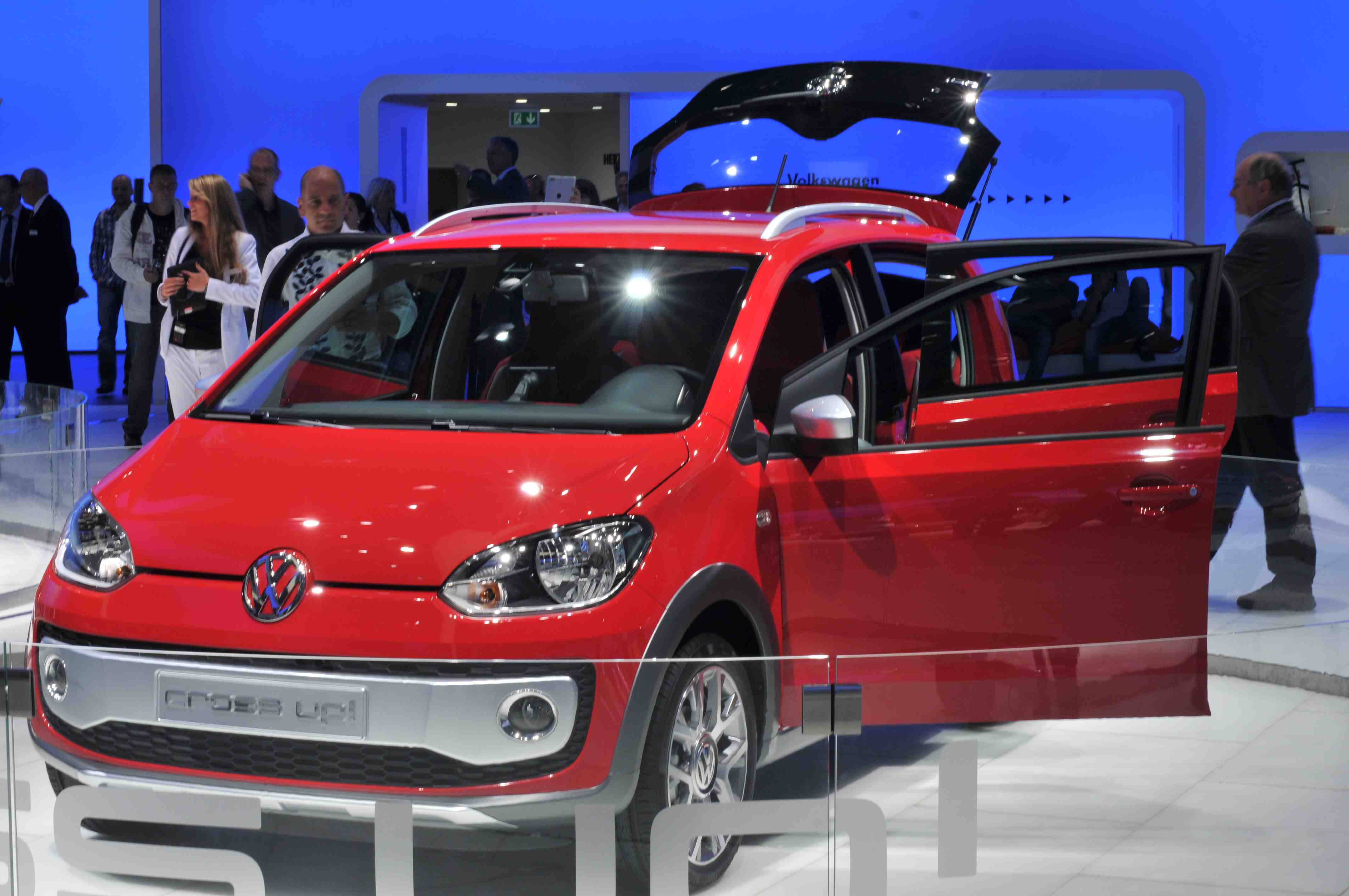 IAA 2011 - Internationale Automobilausstellung in Frankfurt/Main